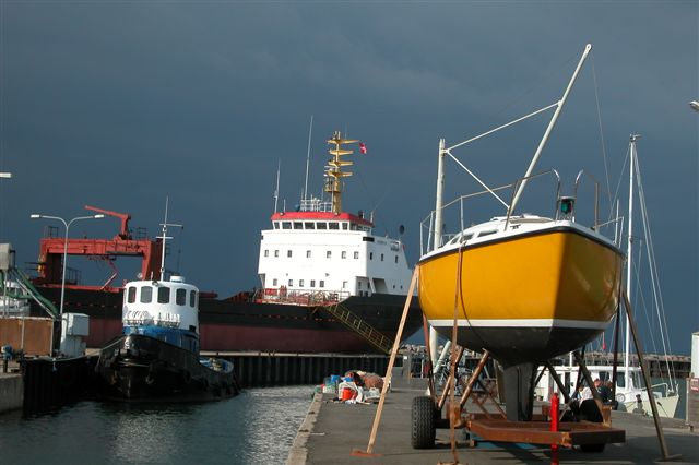 Søby habour, Ærø